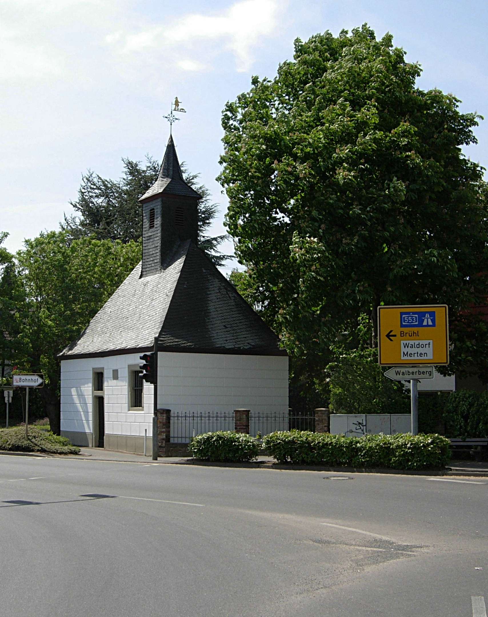 Wendelinuskapelle (vgl. Wendelin) am Straßenknoten Bahnhofstraße, Eichholzweg, Erfurter Straße, Willmuth- und Wendelinusstraße in Sechtem, Stadt Bornheim. Auf der Steintafel (zwischen Pforte und Fenster) steht: D.O.M.B.V.M. nec non S. Wendelino Iacobus Beller Reverendissimi ac Celsissimi Principis Fernandi Episcopi Paderbornensis & Monasteriensis Cubicularius & Catharina Elisabetha Herselis Coniuges hanc Sacram aediculam erigi curarunt Anno 1680 mense. D.O.M. steht für Deo Optimo Maximo (dem besten und größten Gott) und B.V.M. für Beatae Virgini Mariae (der seligen Jungfrau Maria), so dass der Text ins Deutsche übersetzt lautet: Dem besten und größten Gott, der seligen Jungfrau Maria und auch dem heiligen Wendelin haben die Eheleute Jakob Beller, Kammerherr des ehrwürdigsten und herausragendsten Fürsten Ferdinand[1], Bischofs von Paderborn und Münster, sowie Katharina Elisabeth Herselis dieses geweihte Bauwerk errichten lassen im Jahre 1680, im Monat ... ↑ Ferdinand II. von Fürstenberg, Fürstbischof von Paderborn und Münster This image shows a heritage building in Germany, located in the North Rhine-Westphalian city Bornheim (Rheinland) (no. 4).